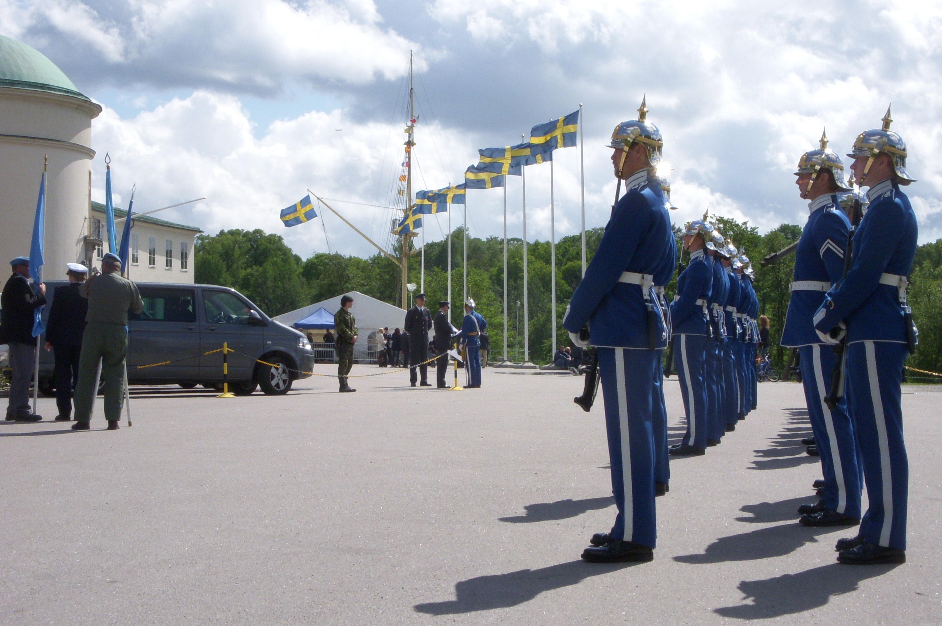 Svenska soldater hedras av ÖB framför Sjöhistoriska museet på Djurgården, 29 maj 2011.